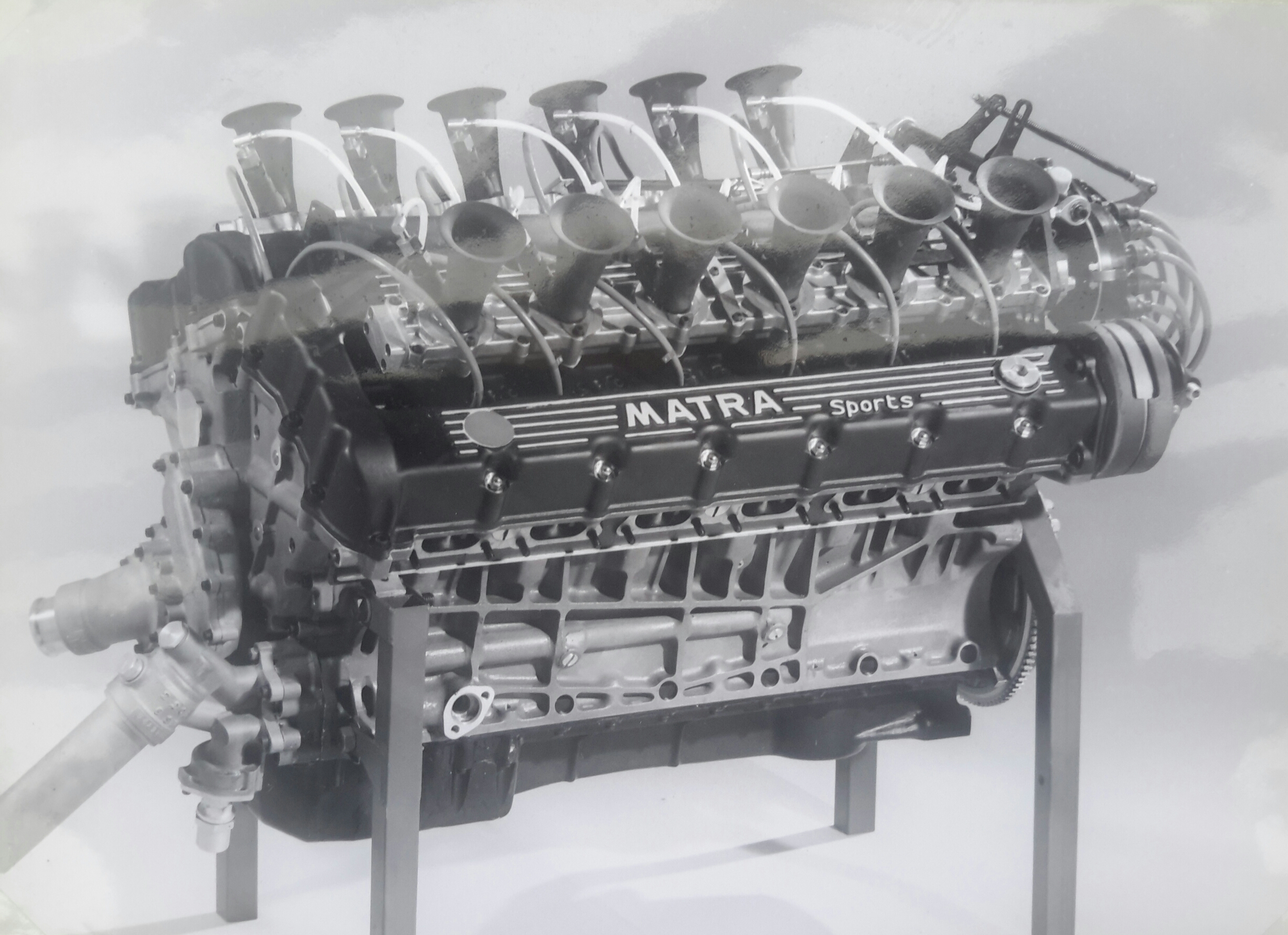 Première version du V12 Matra élaboré par Georges Martin et son équipe